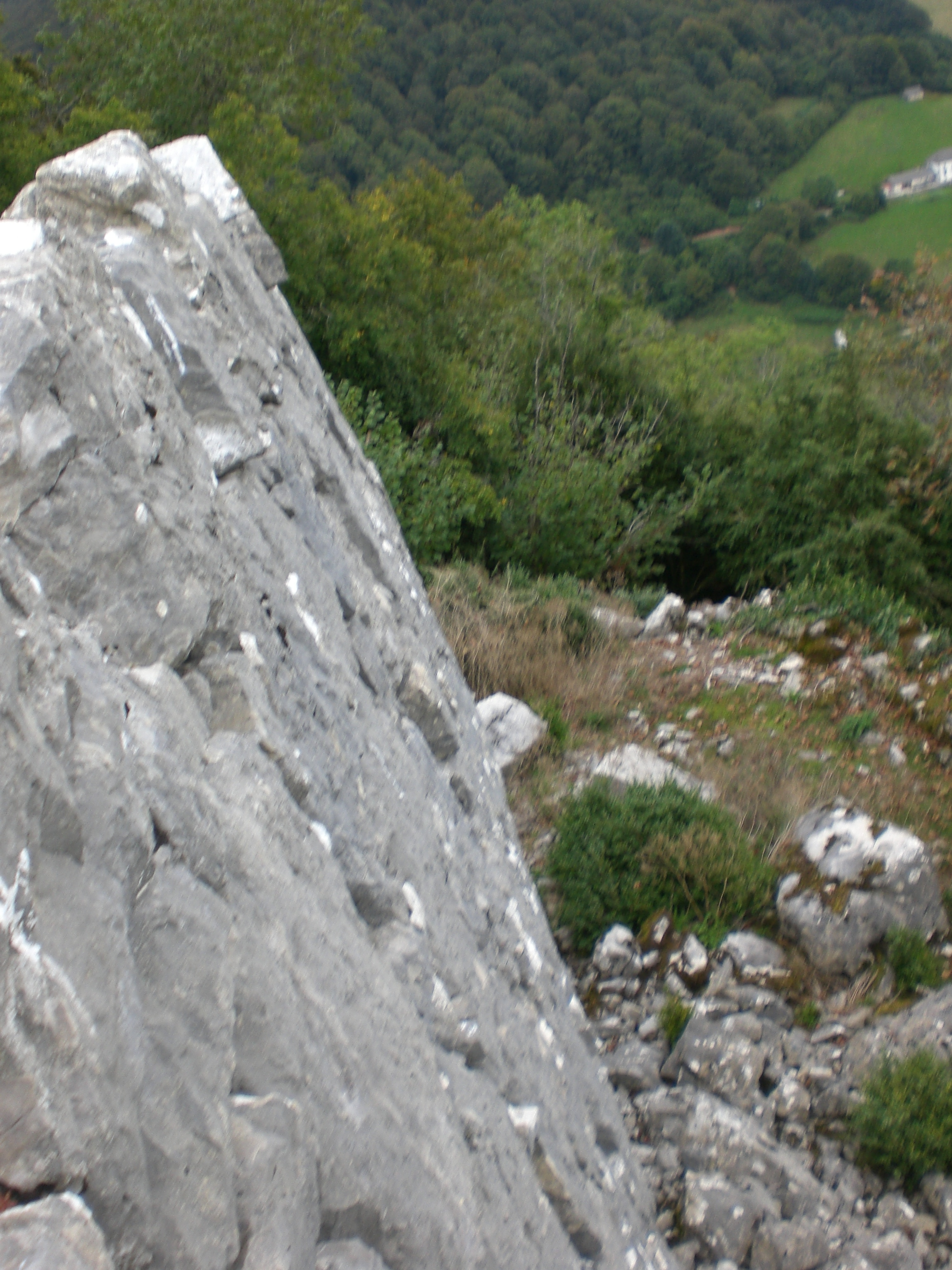 Arlekiako gazteluko argazkia